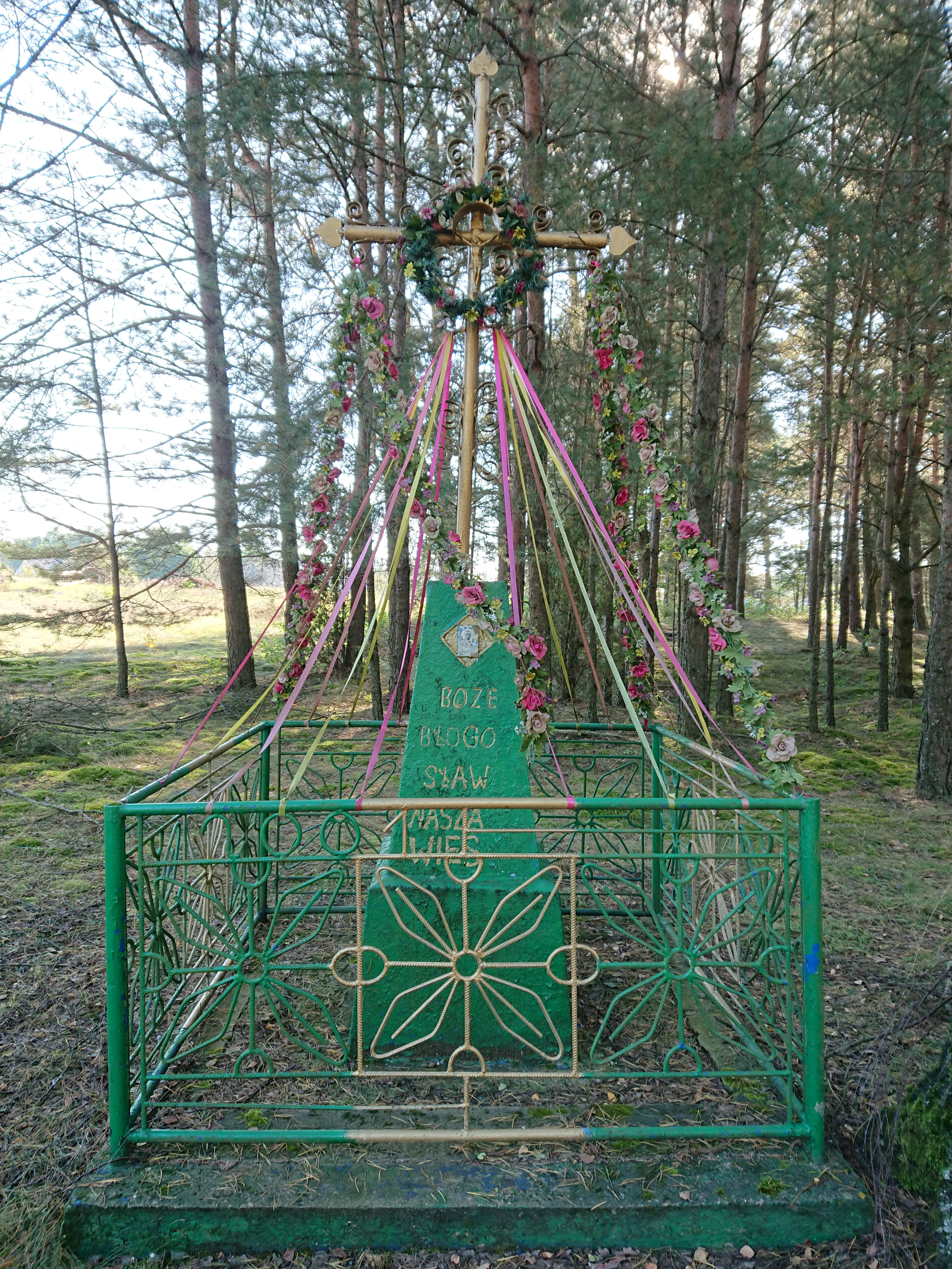 Kapliczka przydrożna w Zamościu (gmina Długosiodło)